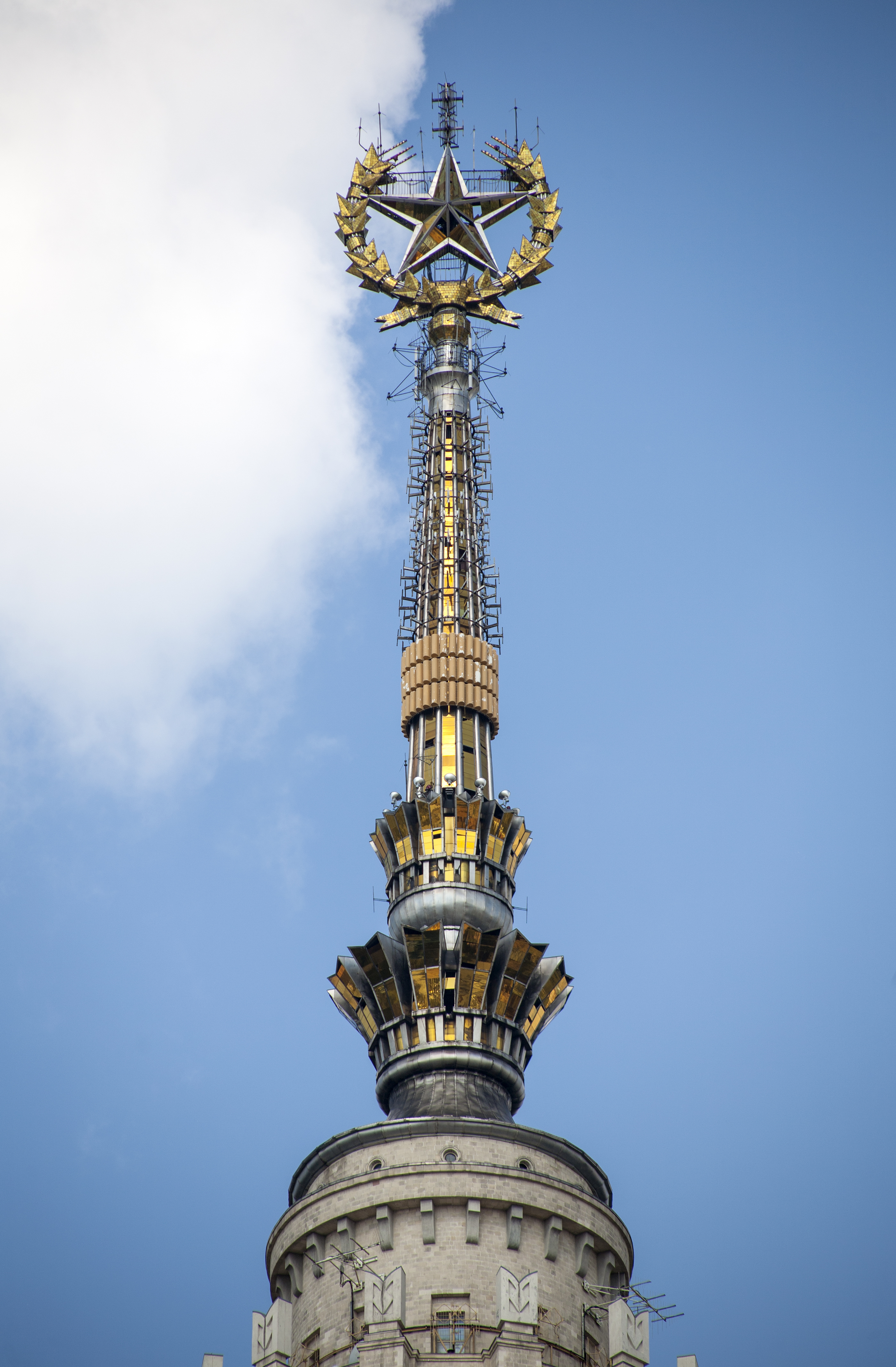 Главное здание Московского государственного университета. Завершение шпиля